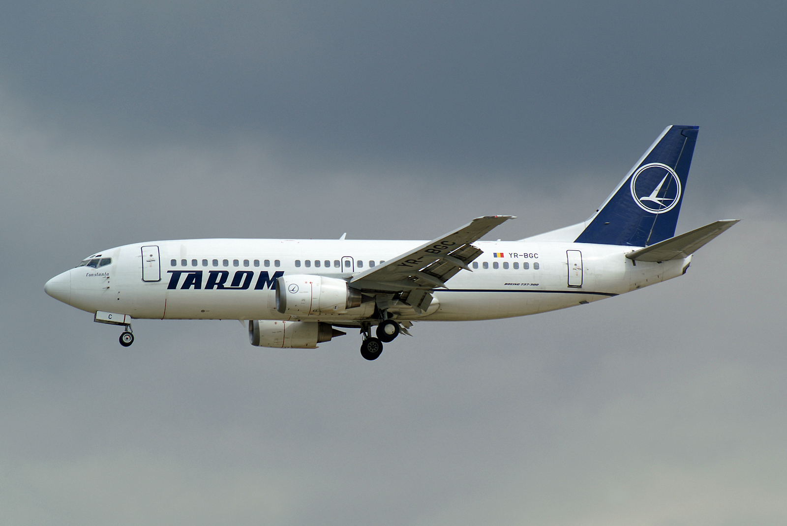 Frankfurt am Main (Rhein-Main AB) (FRA / EDDF / FRF) Germany 7.2005